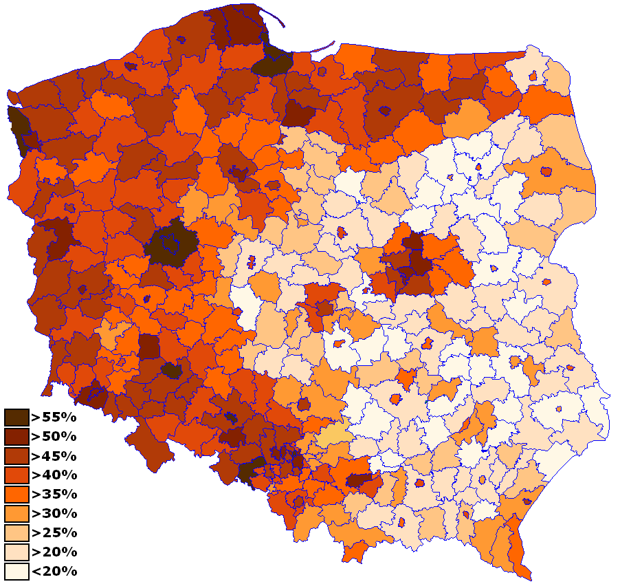 Polish parliamentary election, 2007 - Civic Platform votes by counties POL: Wybory parlamentarne w Polsce w 2007 roku - wyniki Platformy Obywatelskiech w poszczególnych powiatach